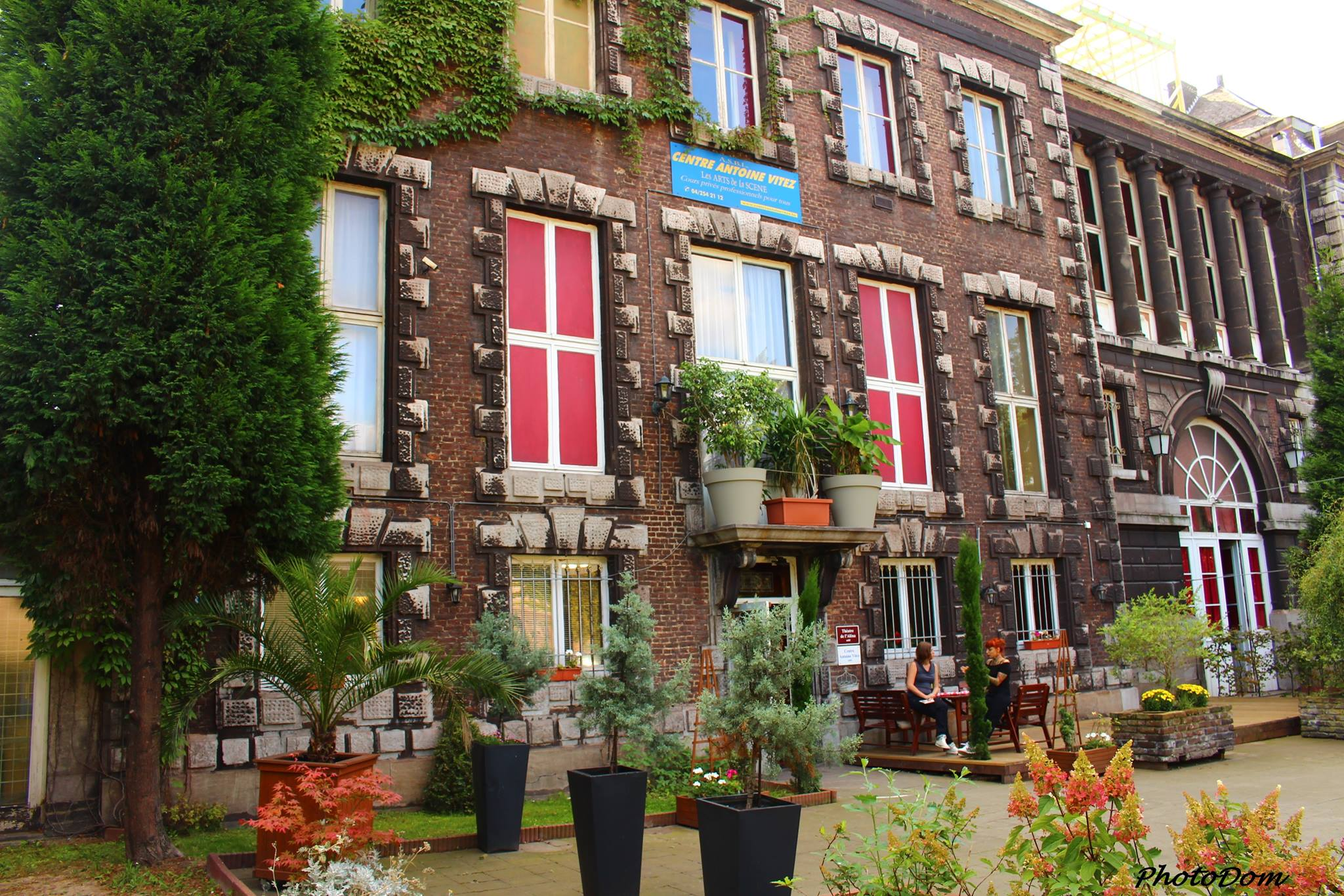 Château de Sclessin, 2016